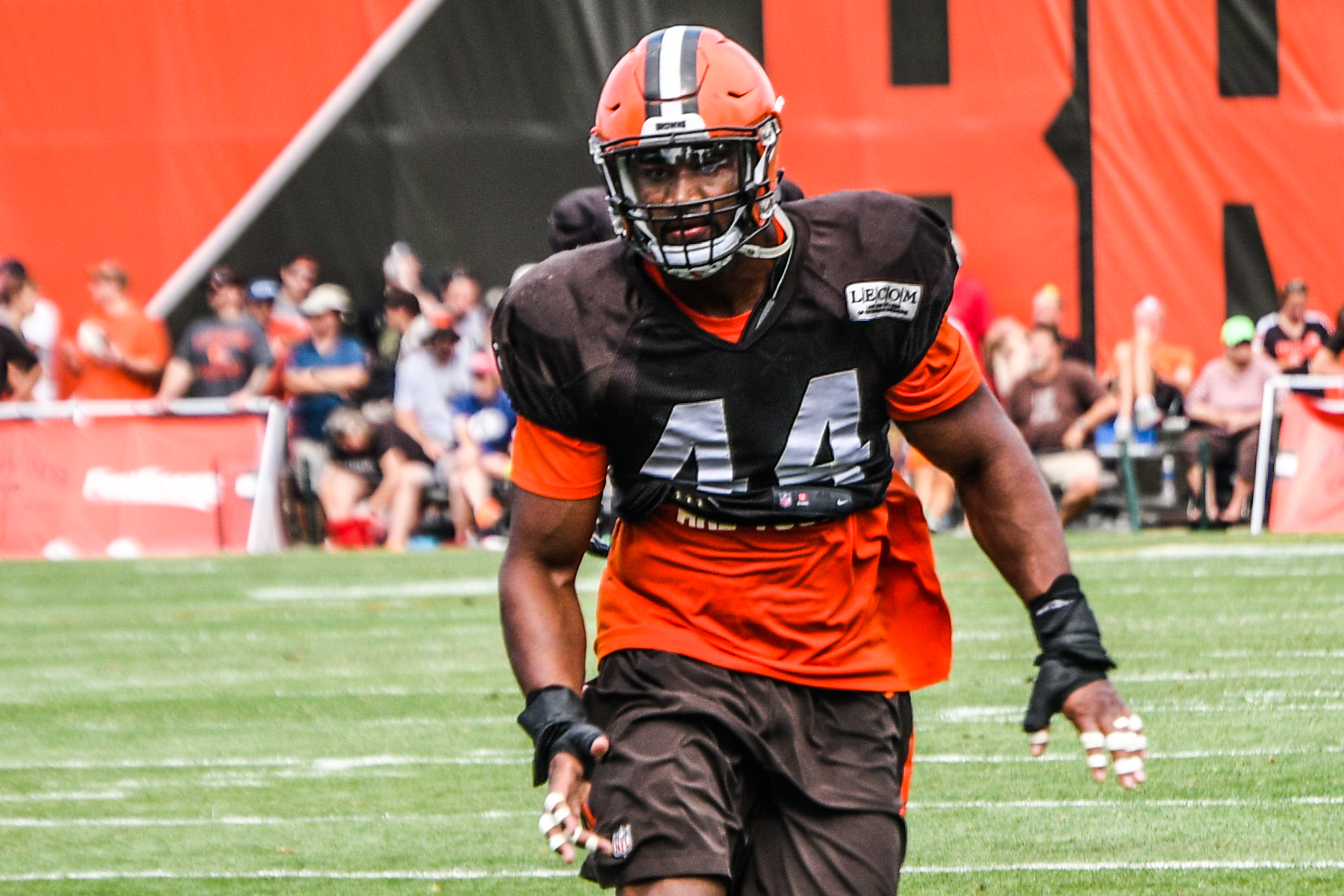 Nate Orchard